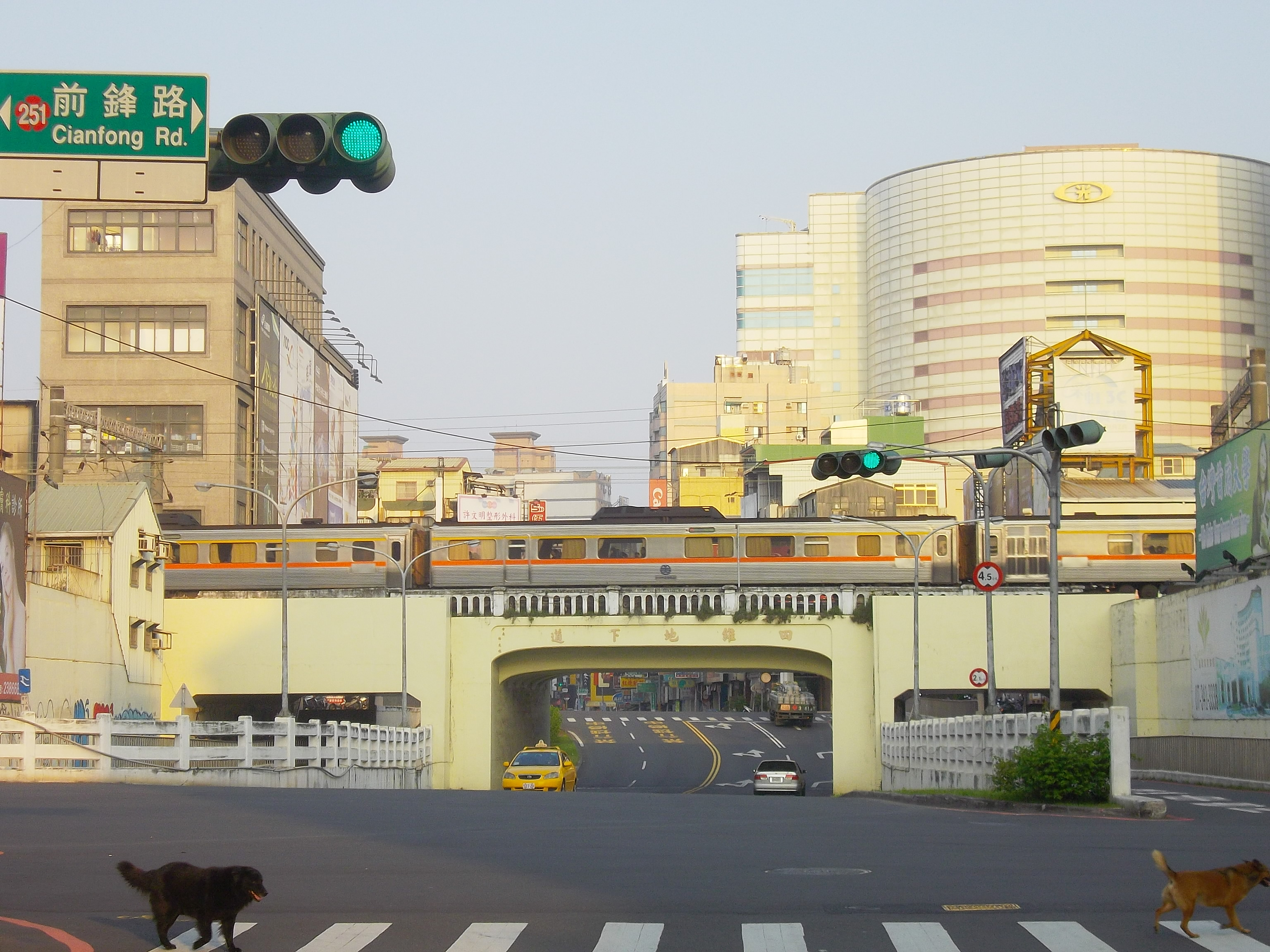 前鋒路路標牌與四維地下道